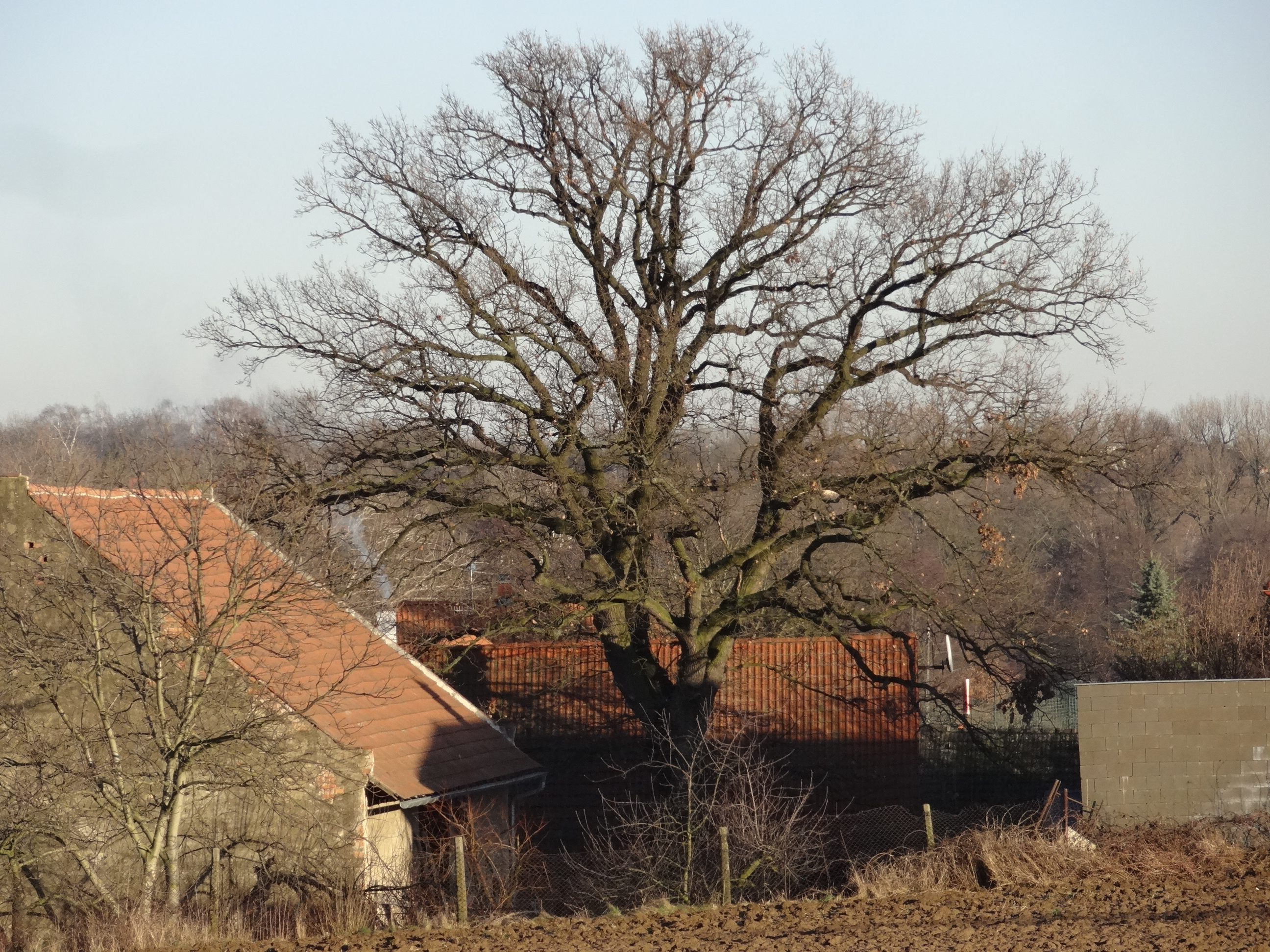 Pitkovičky - dub letní za bývalou kovárnou čp. 18 (ul. V Pitkovičkách)